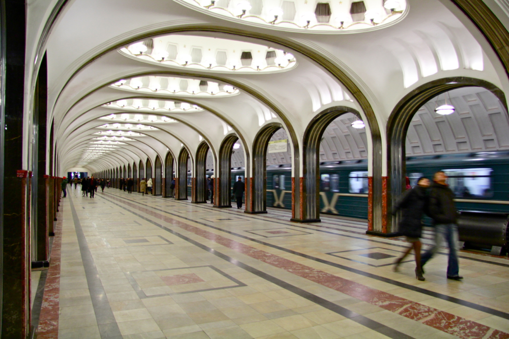 Zamoskvoretskaya Line (Замоскворецкая линия) Moscow Metro (Московский метрополитен)